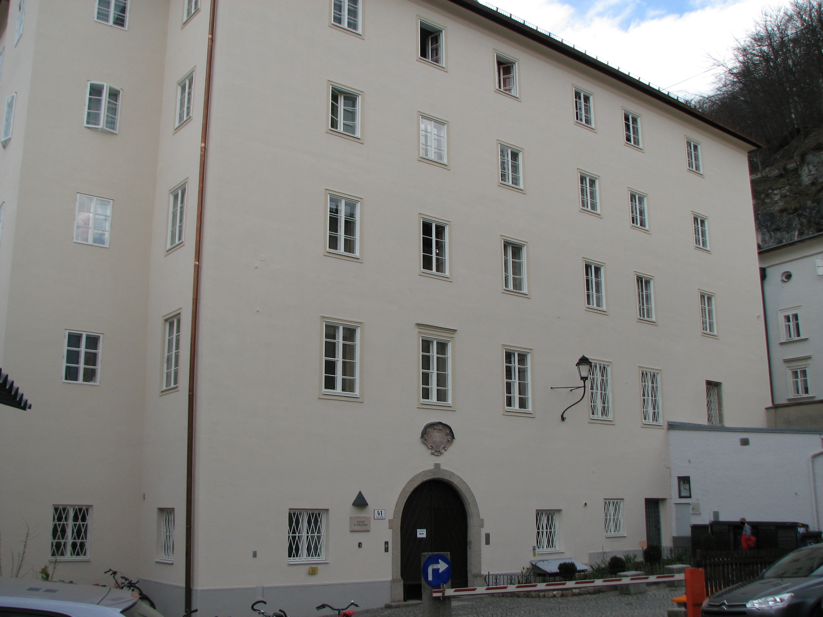 ehem. St. Sebastian-Bruderhaus/Studentenheim